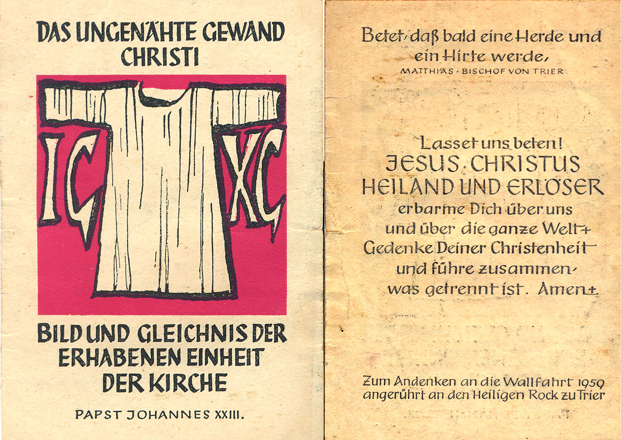 Image pieuse de l'exposition de la Sainte Tunique de Trèves en 1959 (souvenir de famille)